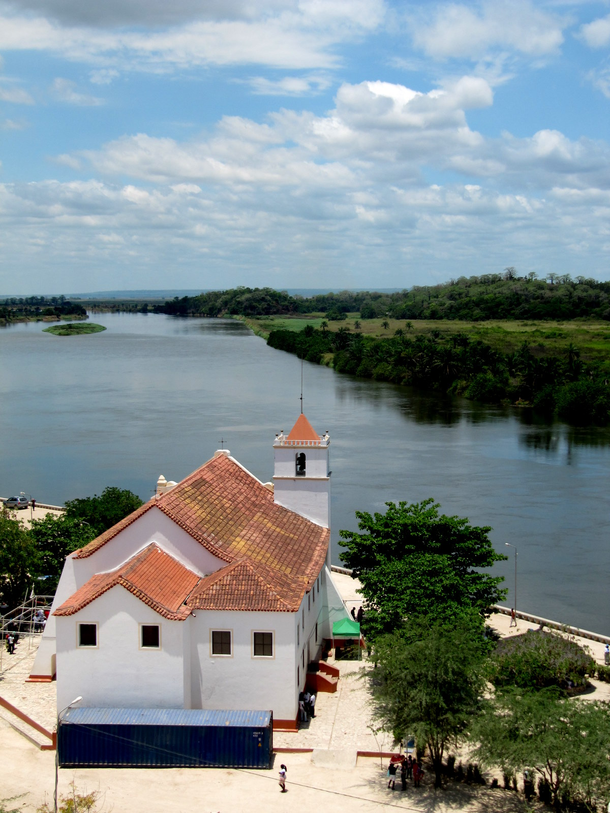 Igreja de Nossa Senhora da Conceição (Século 16), mais conhecida por Senhora de Muxima e o Rio Kwanza, província de Bengo, Angola (pt); Church of Our Lady of Conception (pt: Nossa Senhora da Conceição) (16th Century) above the river Kwanza, better known as Lady of Muxima, Bengo province, Angola (en)